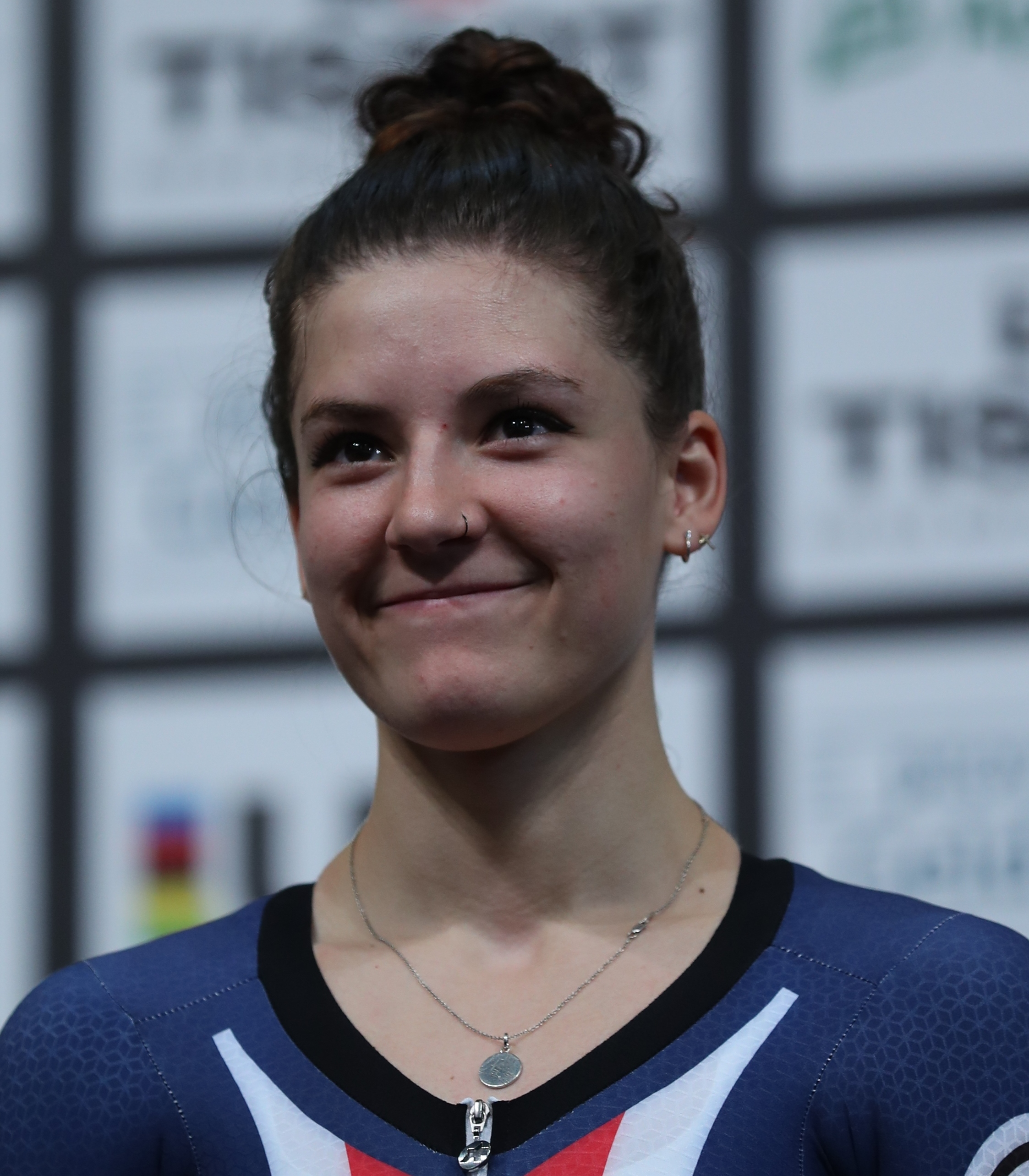 Chloé Dygert, US-amerikanische Radsportlerin